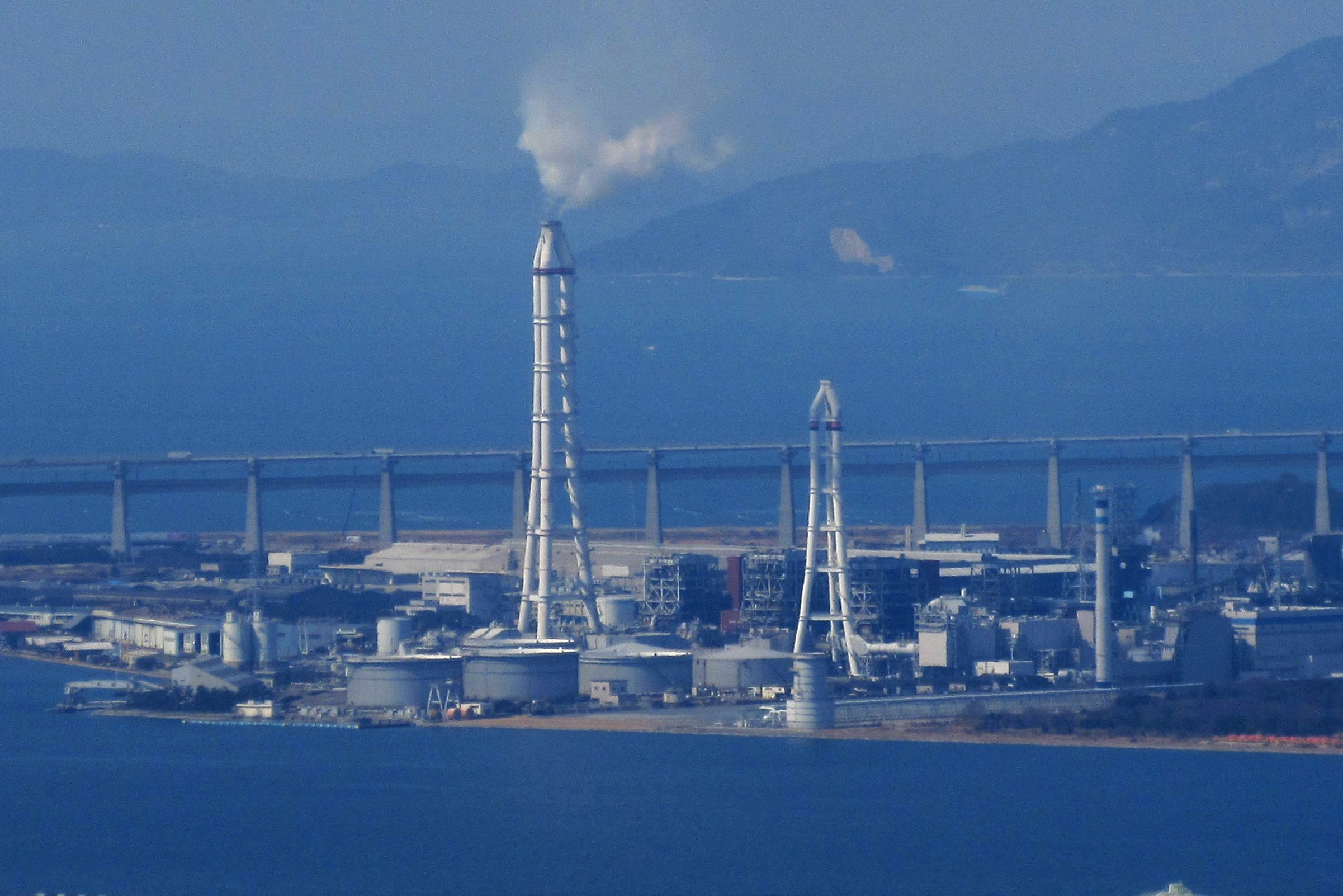 四国電力坂出発電所（白峯山より）